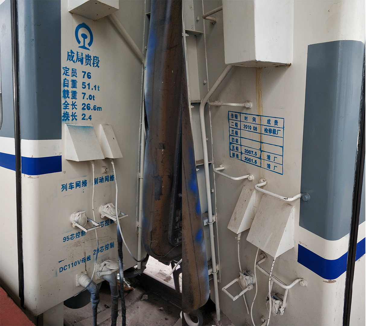 中文（中国大陆）: DJF2的配属及车厢信息和修程表